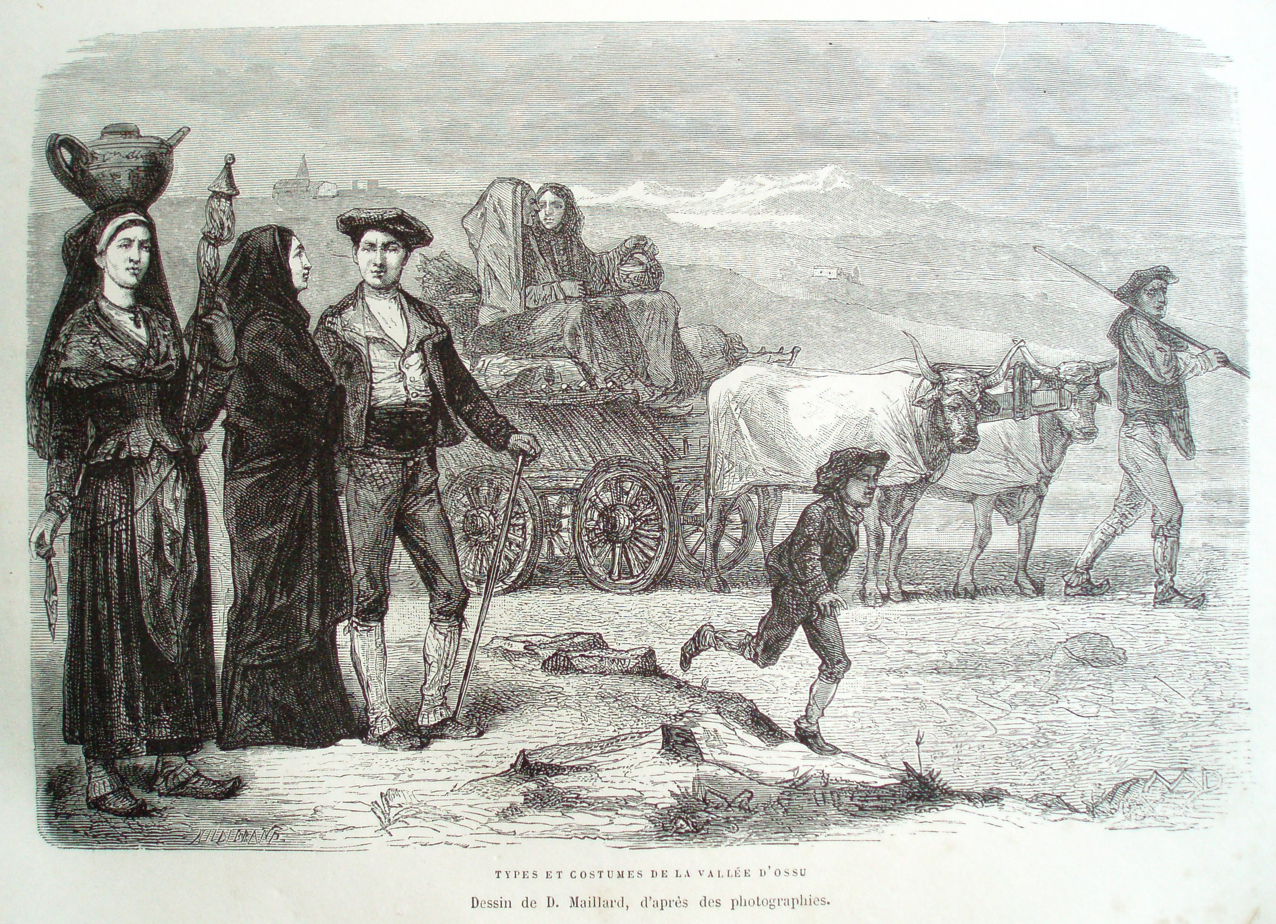 Types et costumes traditionnels de la vallée d'Ossu (vallée d'Ossau), dessin de D. Maillard d'après des photographies, in: Élisée Reclus, Nouvelle géographie universelle, t.2: La France, 1877, p. 143.